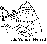 Als Sønder Herred, Sønderborg Amt, Danmark.